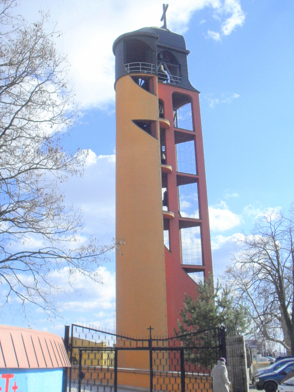 Wrocław, kościół pw. Ducha Świętego, dzwonnica